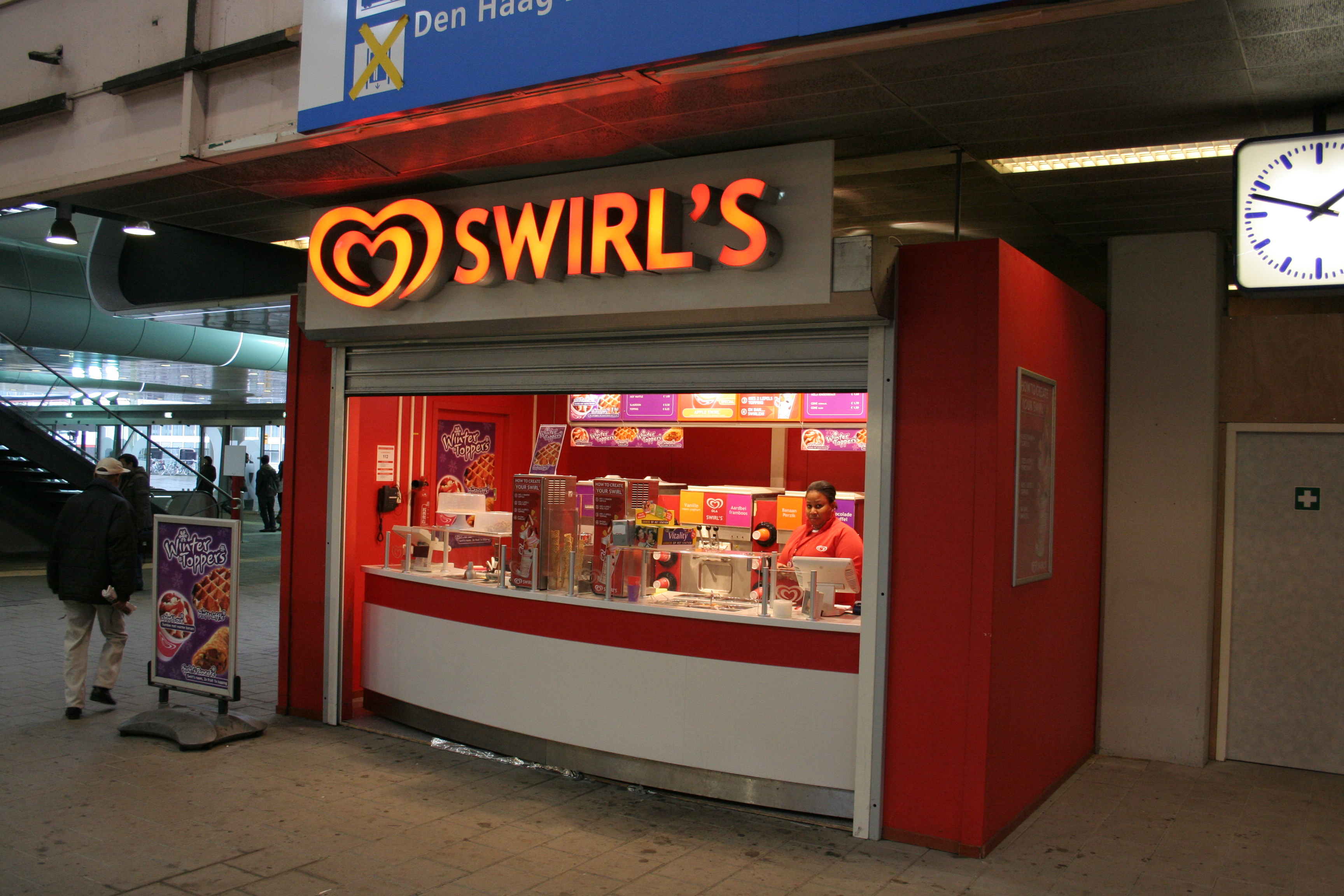 Swirl's-winkel te Den Haag